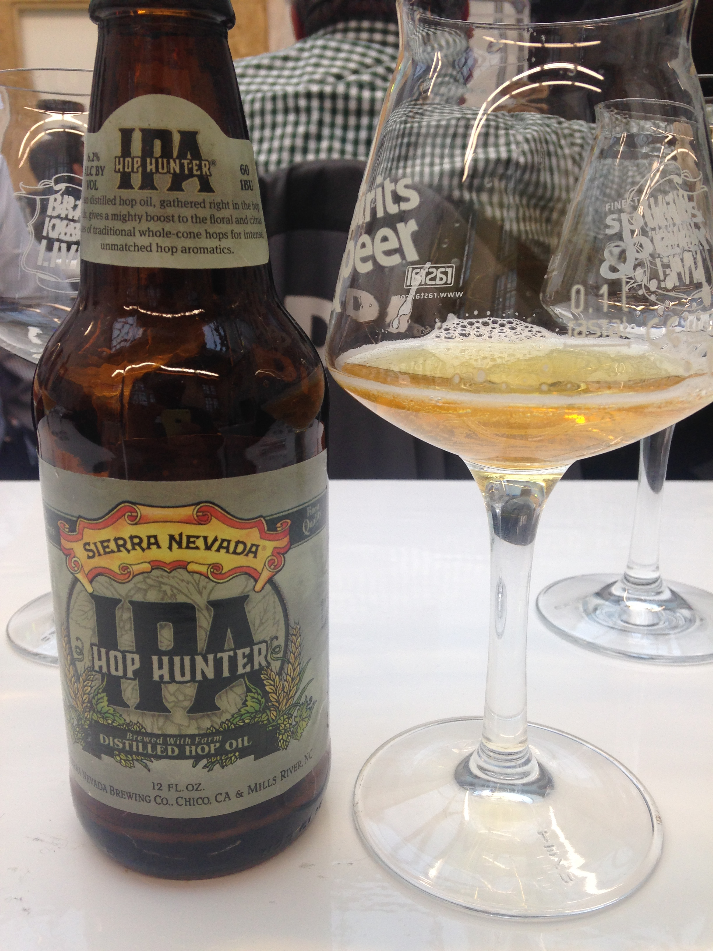 Braukunst live 2016 Bier India Pale Ale "Hop Hunter IPA" der Sierra Nevada